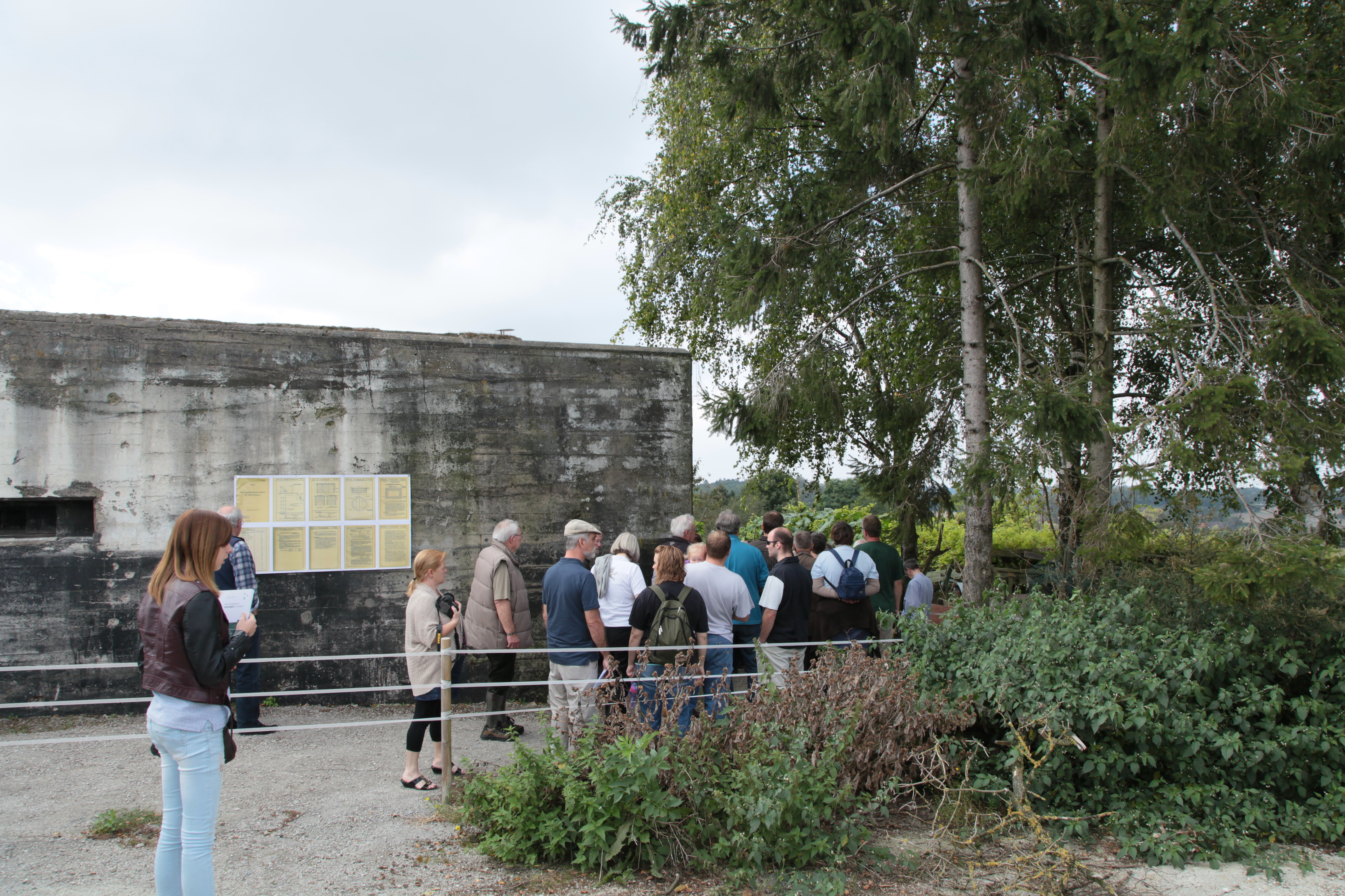 Leitbunker der Kruppschen Nachtscheinanlage, Asbachtal in Velbert